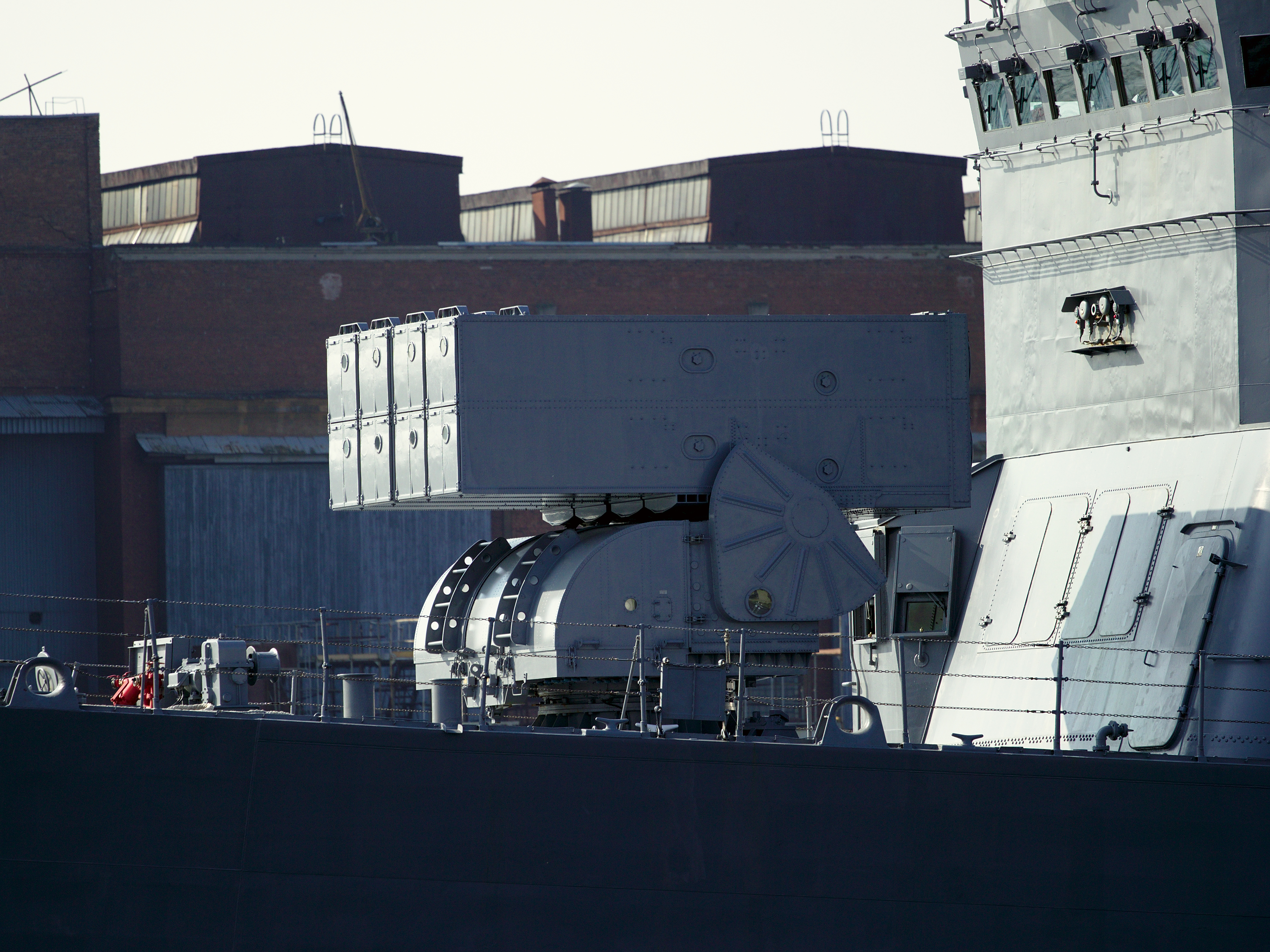 Передняя пусковая (спереди)